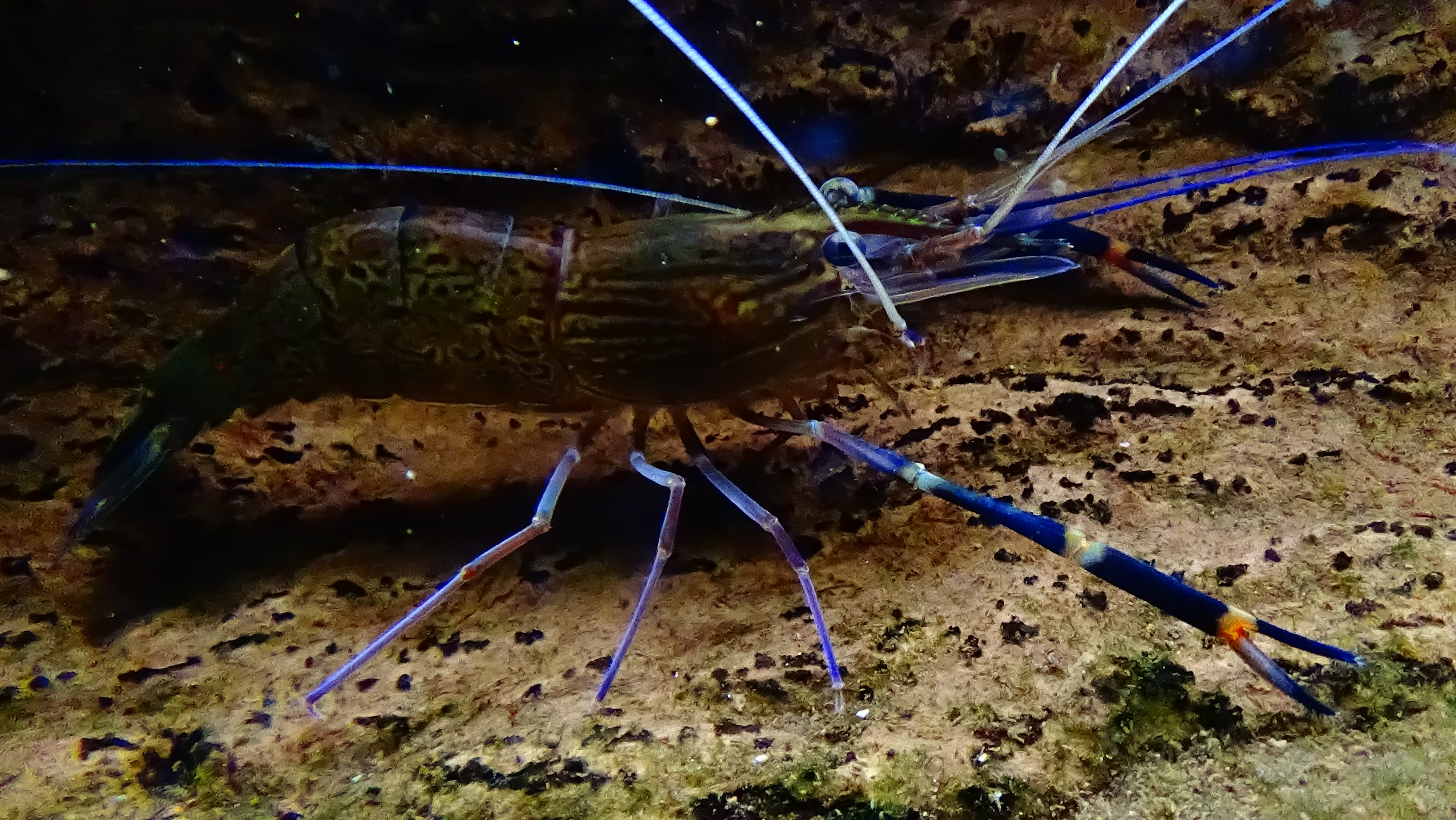 Macrobrachium rosenbergii - crevette géante d'eau douce - Aquarium tropical de la Porte Dorée - 12/2014